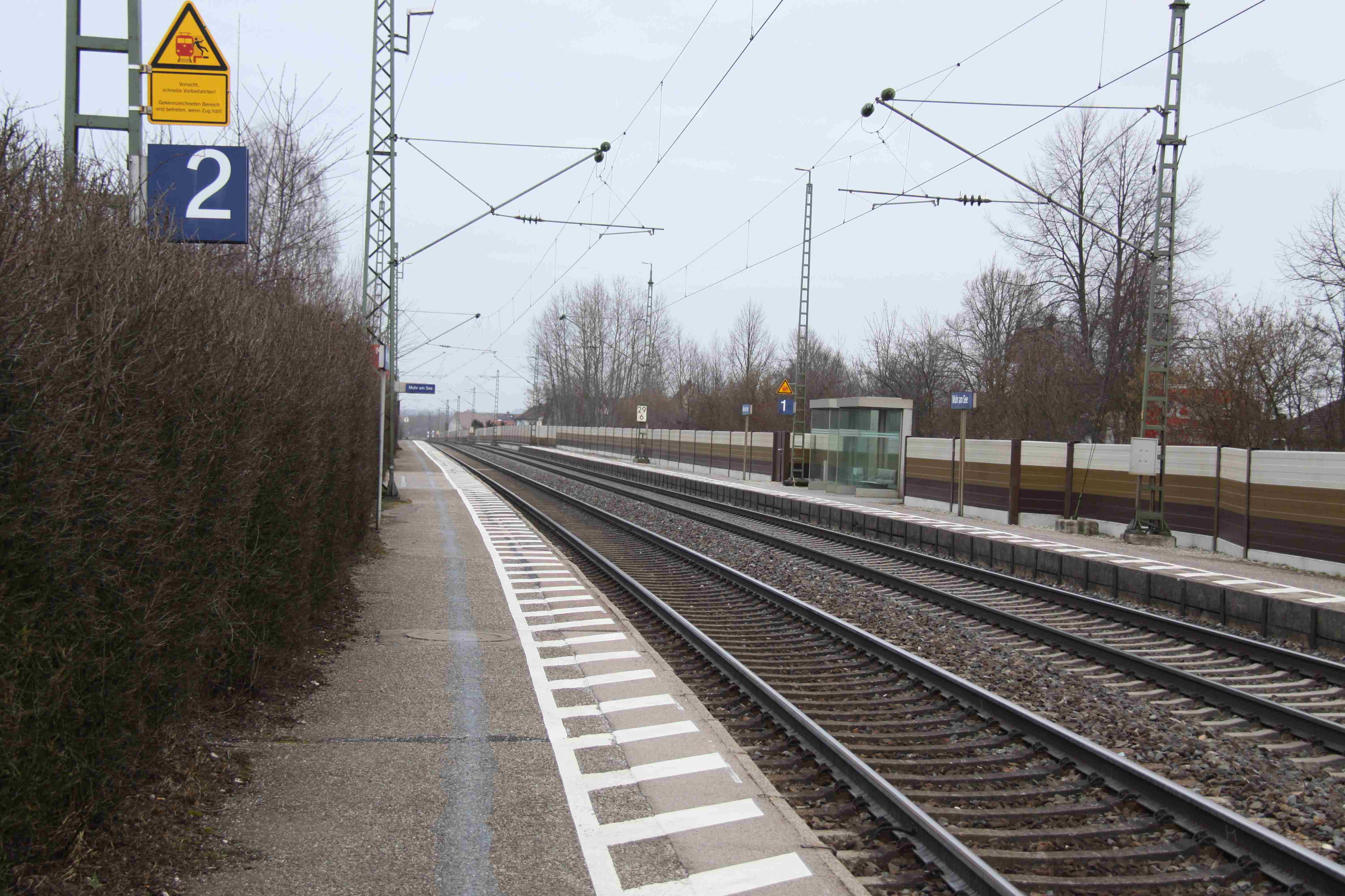 Bahnhof Muhr am See